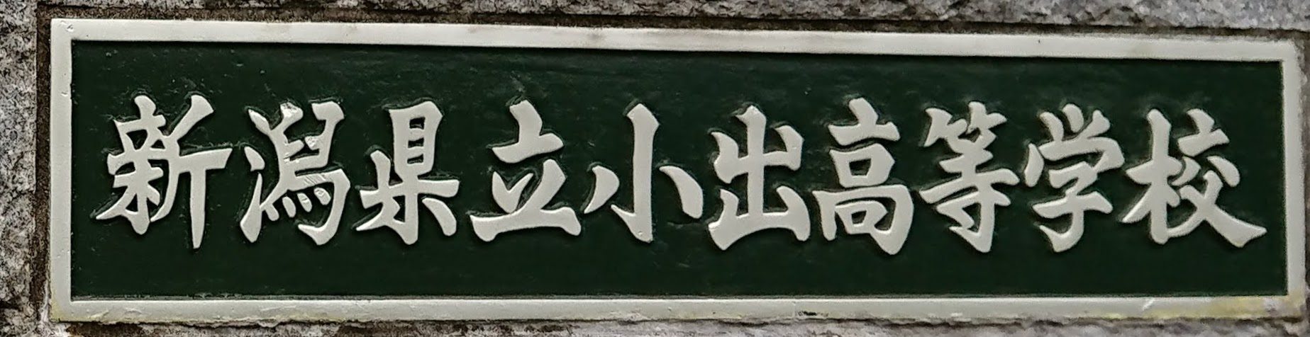 新潟県立小出高校の学校表示